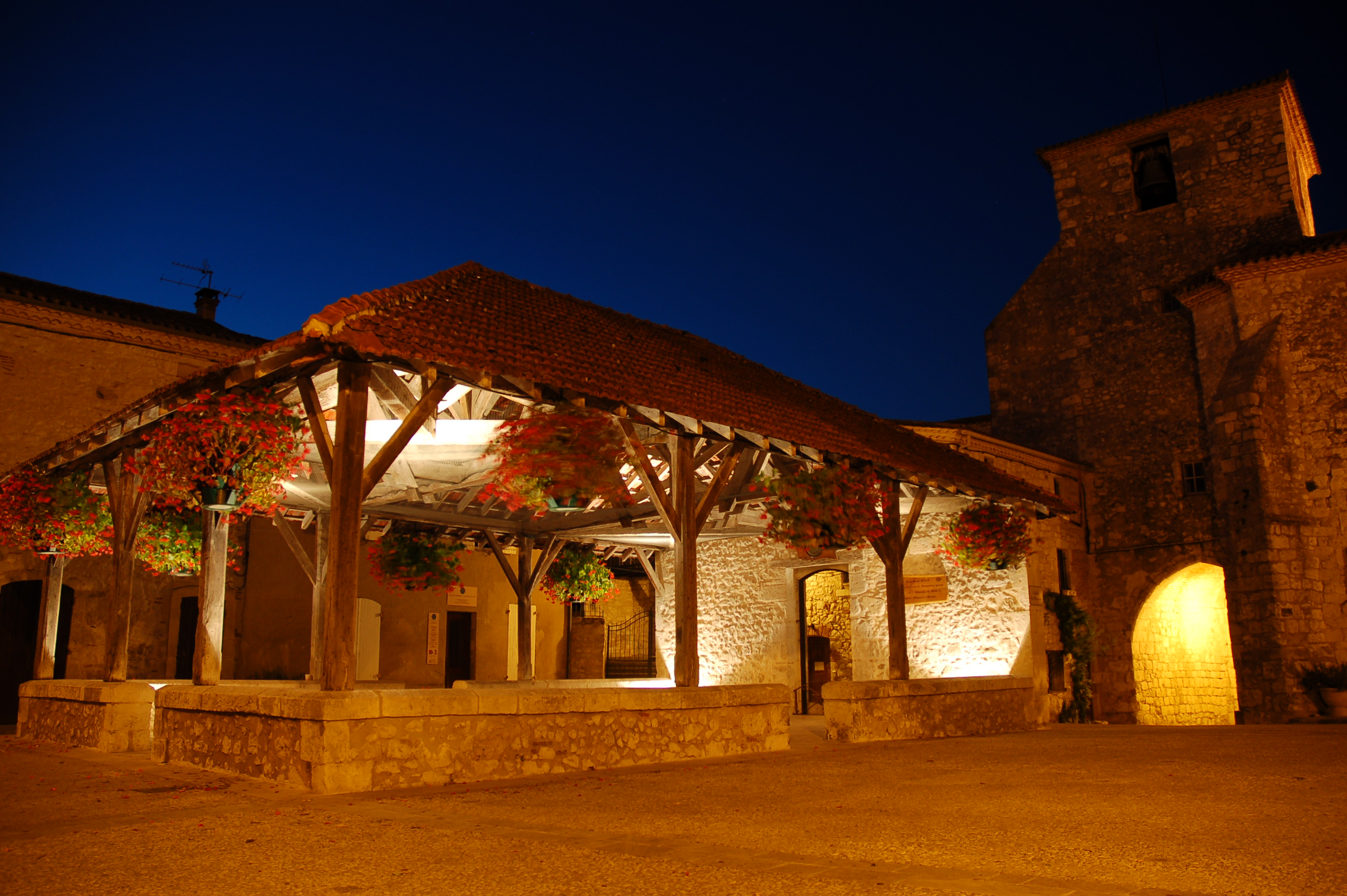 Halle de Pujols